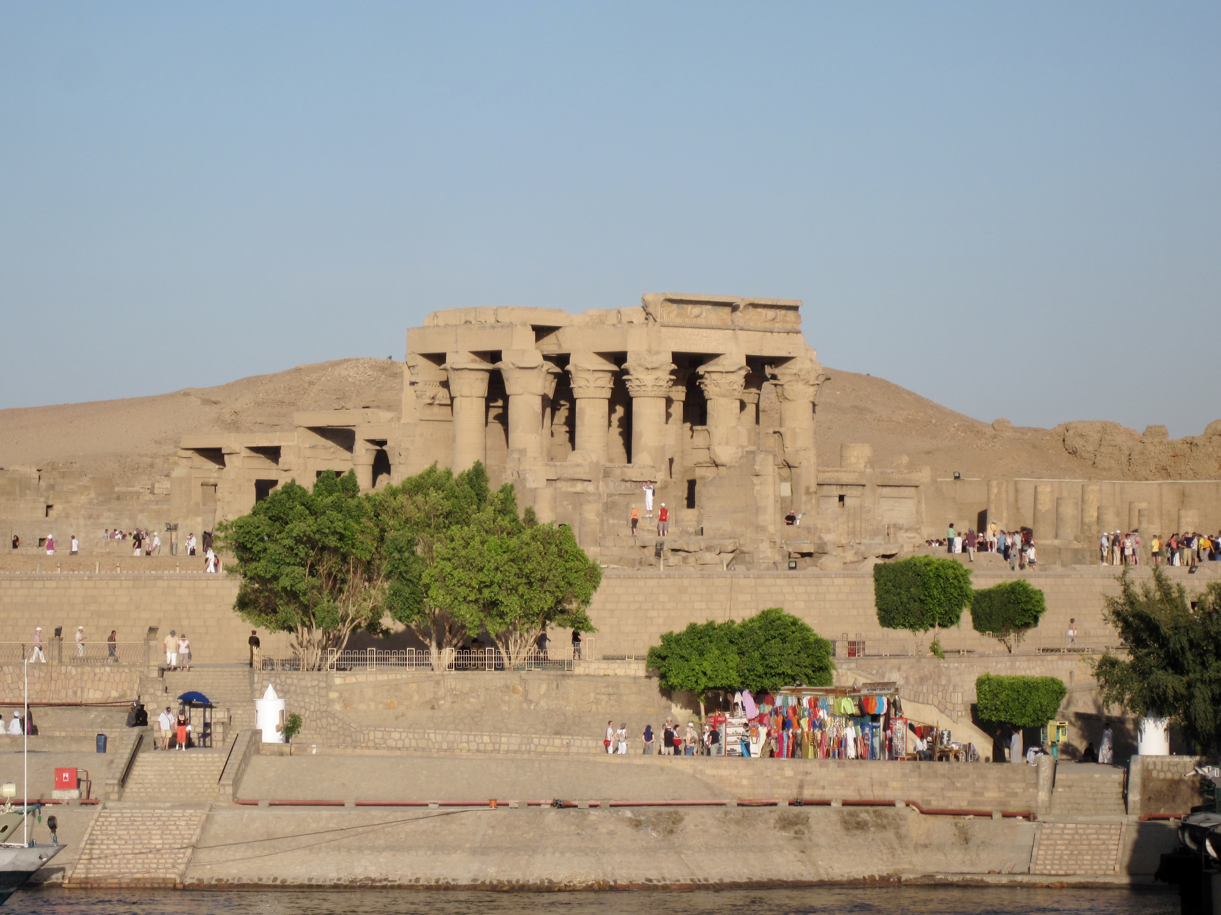 Tempel von Kom Ombo, Ägypten